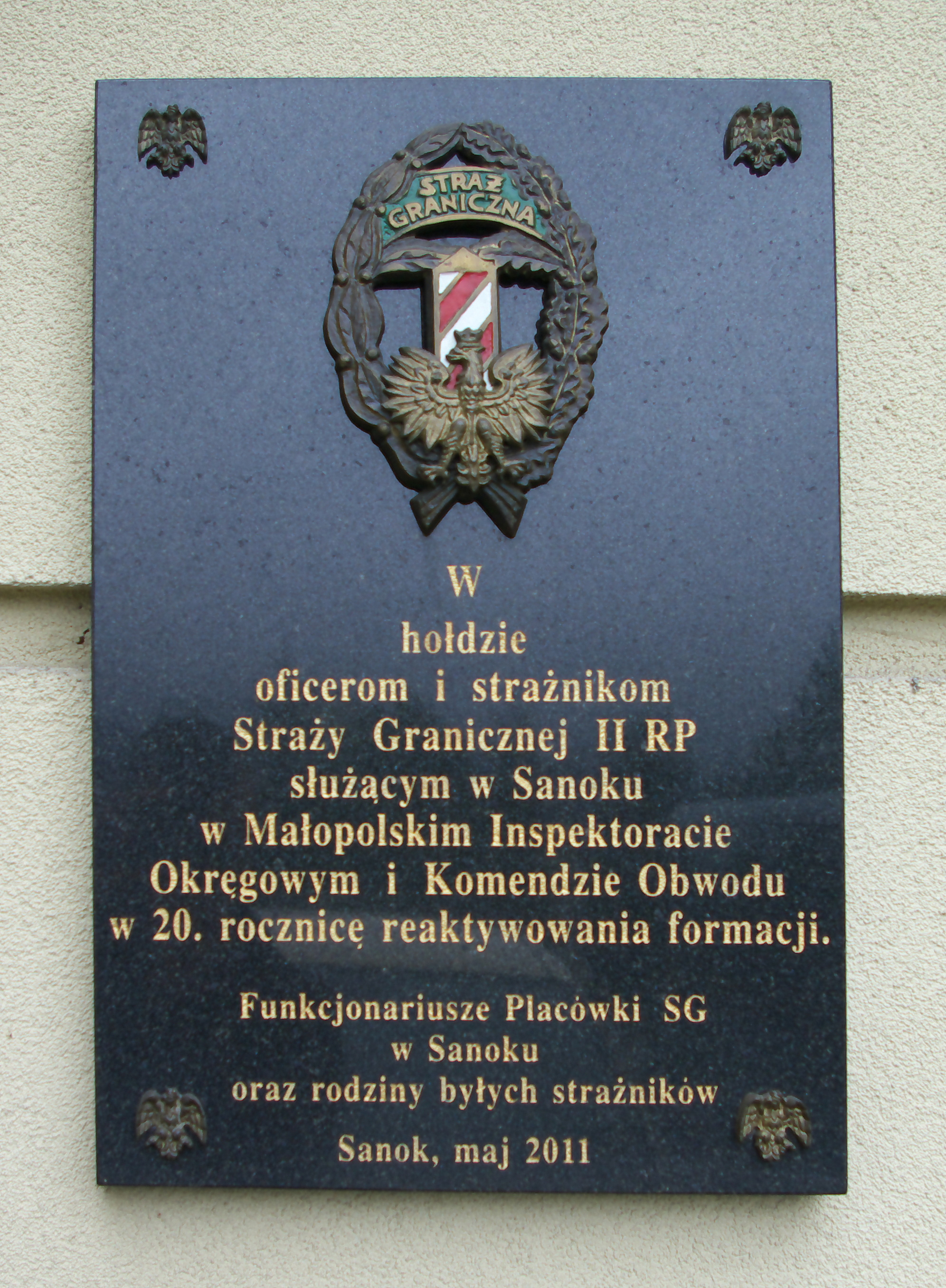 Tablica pamiątkowa na fasadzie budynku przy ulicy Adama Mickiewicza 23. Inskrypcja informuje: W hołdzie oficerom i strażnikom Straży Granicznej II RP służącym w Sanoku w Małopolskim Inspektoracie Okręgowym i Komendzie Obwodu w 20. rocznicę reaktywowania formacji. Funkcjonariusze Placówki SG w Sanoku oraz rodziny byłych strażników. Sanok, maj 2011. Zdjęcie zostało wykonane 10 marca 2016 za zgodą funkcjonariuszy Placówki SG w Sanoku.